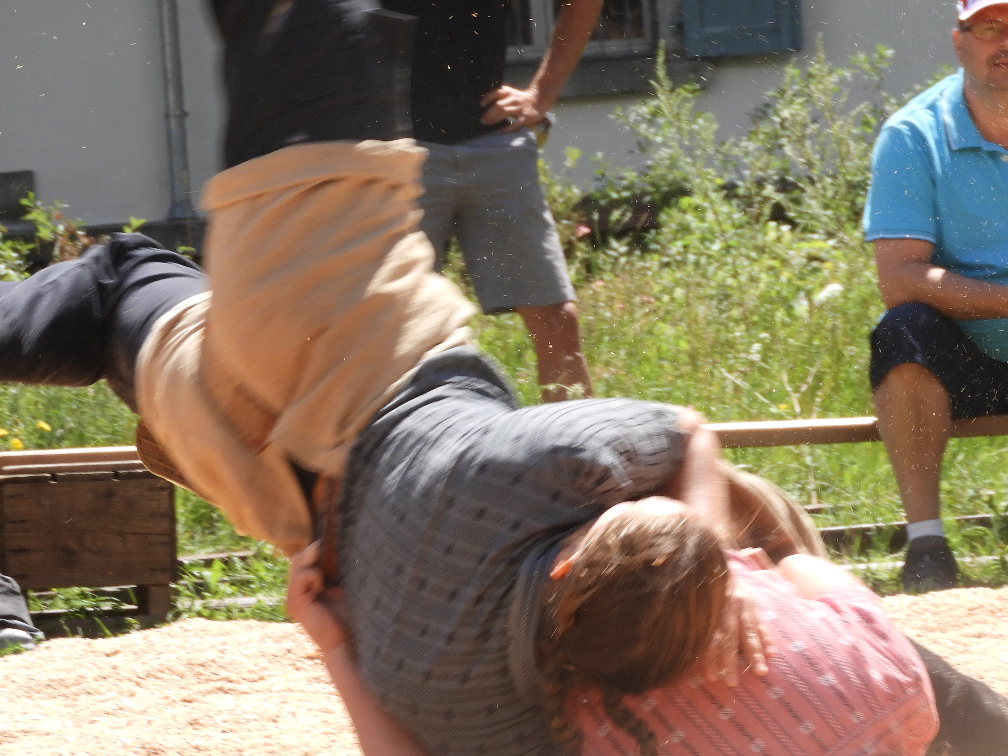 Frauenschwingen, Schweiz